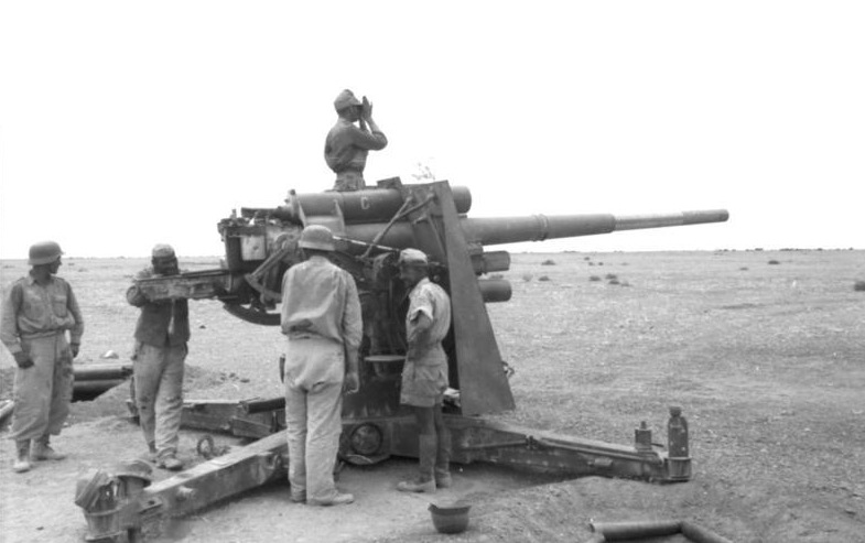 4.6.1942 Vor Bir Hacheim, einem engl. wichtigen Stützpunkt und Wasserstelle, 8,8 cm-Flak in Feuerstellung zur Niederhaltung der feindlichen Artillerie